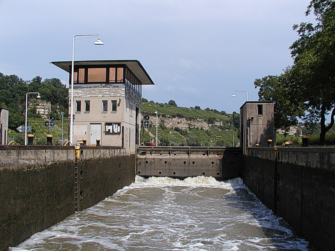 Die Neckarschleuse Poppenweiler